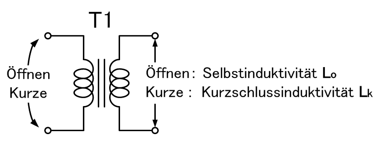 Messung der Leckage